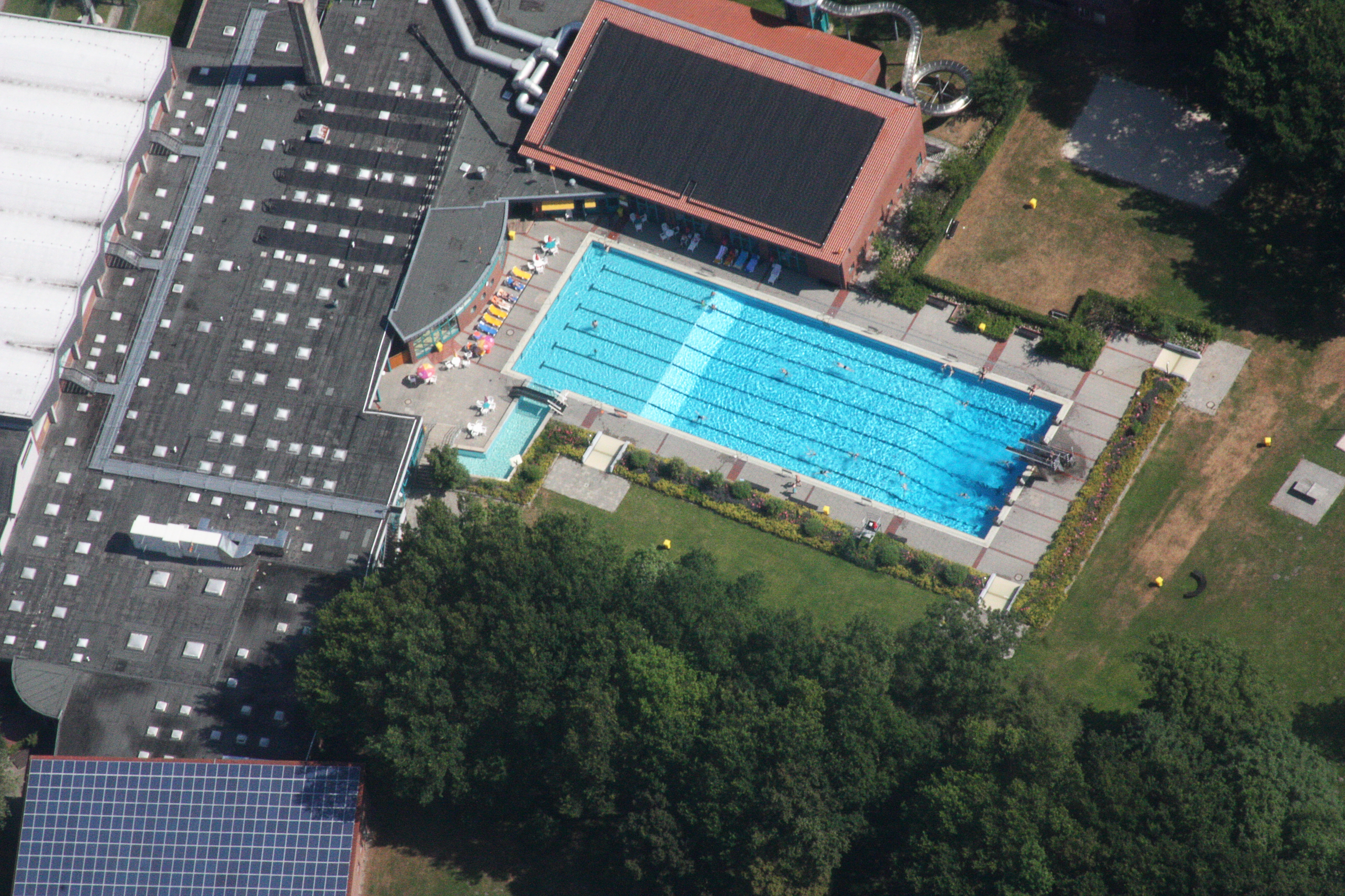 Luftaufnahme; Freibad Westerstede; Flug von Bad Zwischenahn nach Westerstede; Flughöhe 1500 ft; Juli 2010; Originalfoto bearbeitet: Tonwertkorrektur und Bild geschärft mit Hochpassfilter